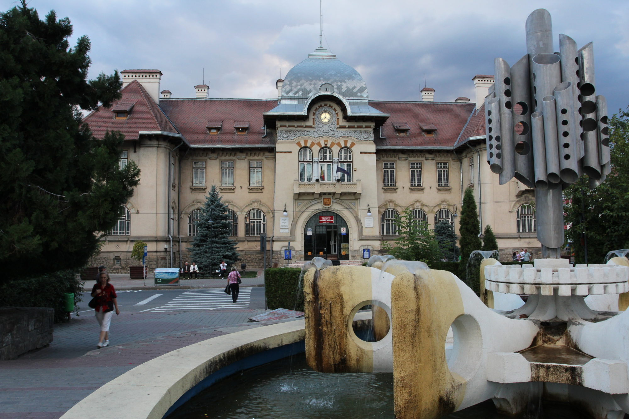 Complexul Muzeal Județean Piatra Neamț. Aceasta este o imagine cu un monument istoric din România, clasificat cu numărul NT-II-m-B-10560